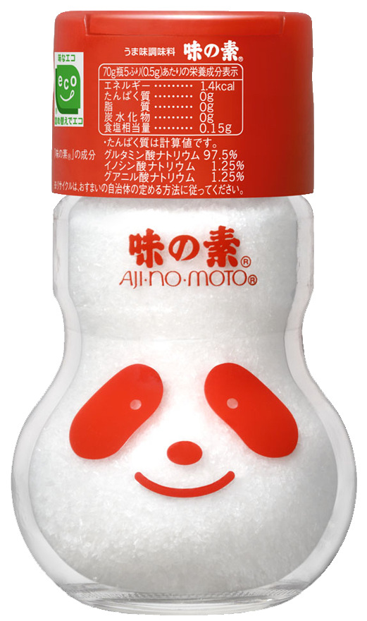 市販の製品「味の素」70gボトル